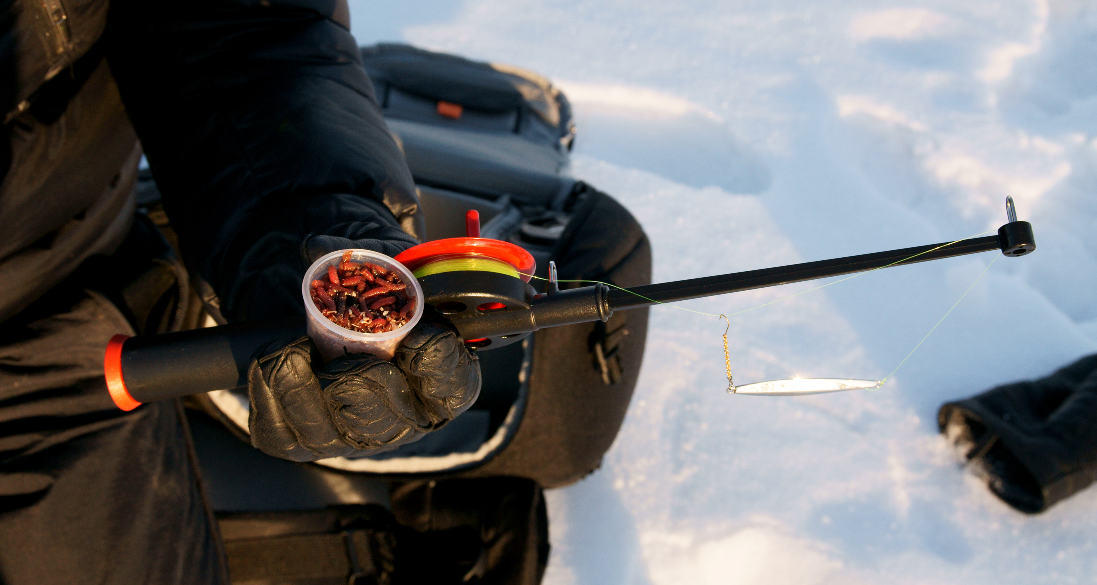 Pilkkivapa, toukkia ja muuta pilkkitilpehööriä.